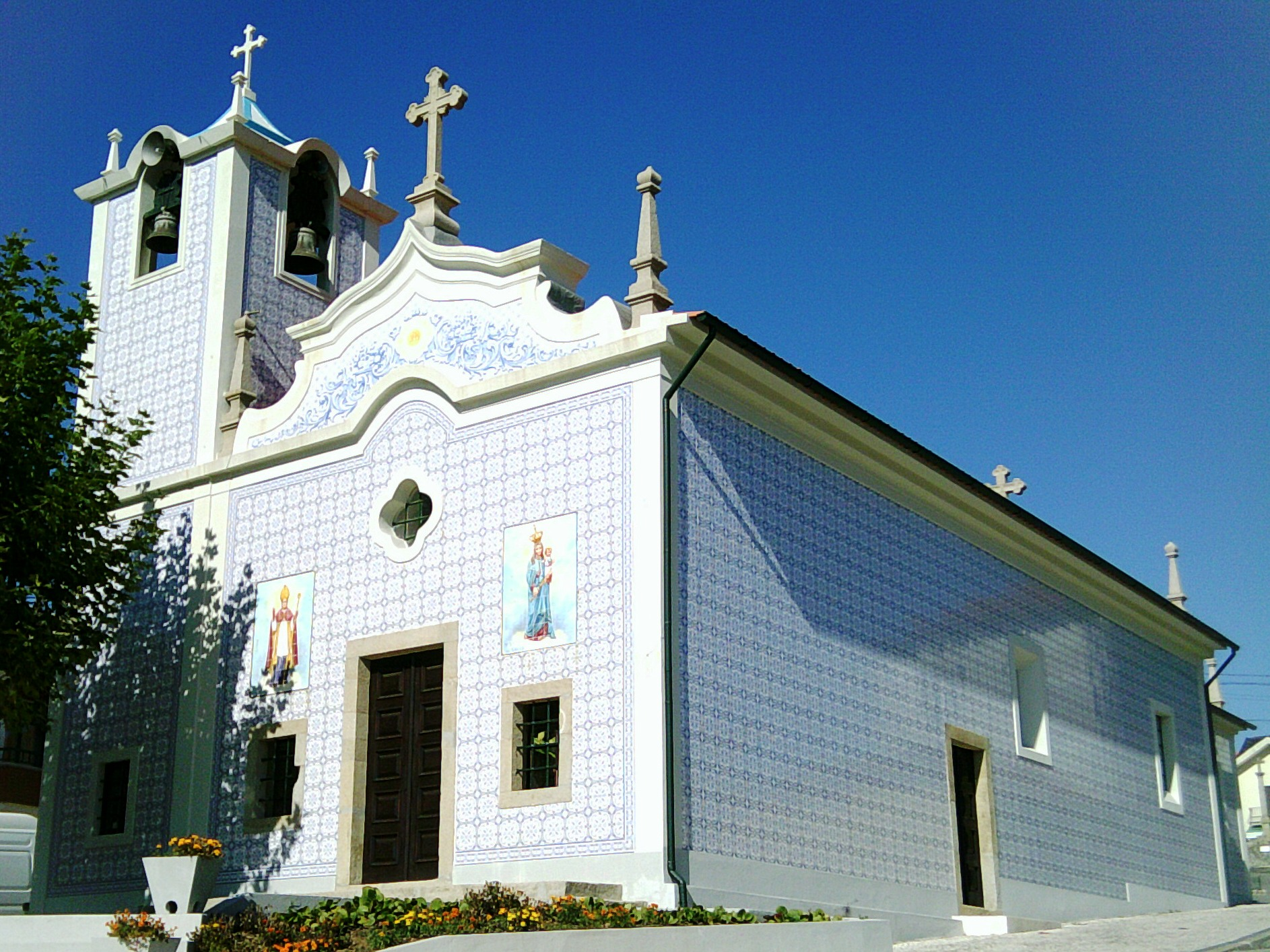 Capela de São Geraldo, freguesia de Maceda, concelho de Ovar, distrito de Aveiro, Portugal.